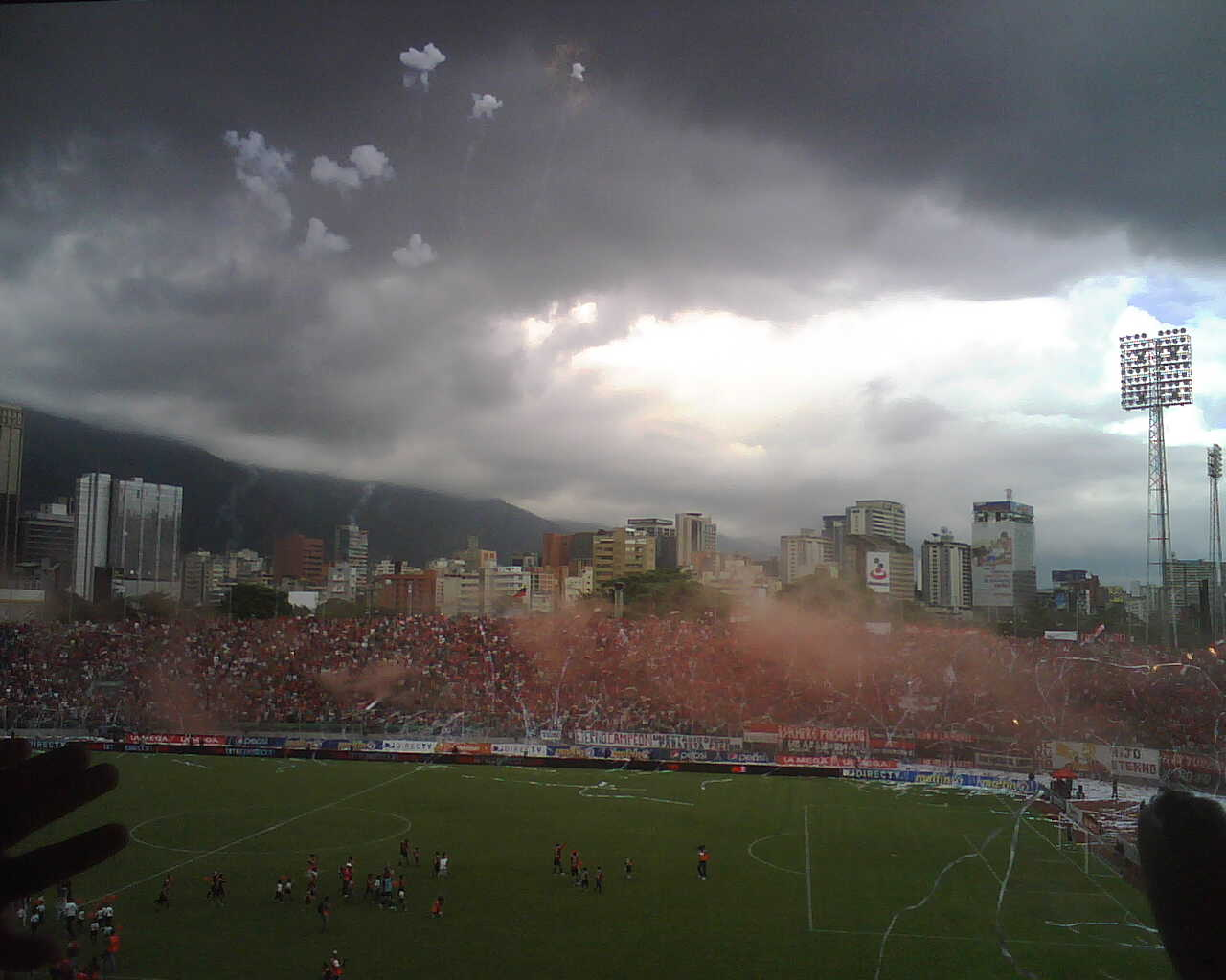 Partido Final del torneo Clausura 2011 donde el Caracas FC enfrentaba al Zamora FC, a la postre campeon del torneo corto y subcampeón de la temporada 2010-2011